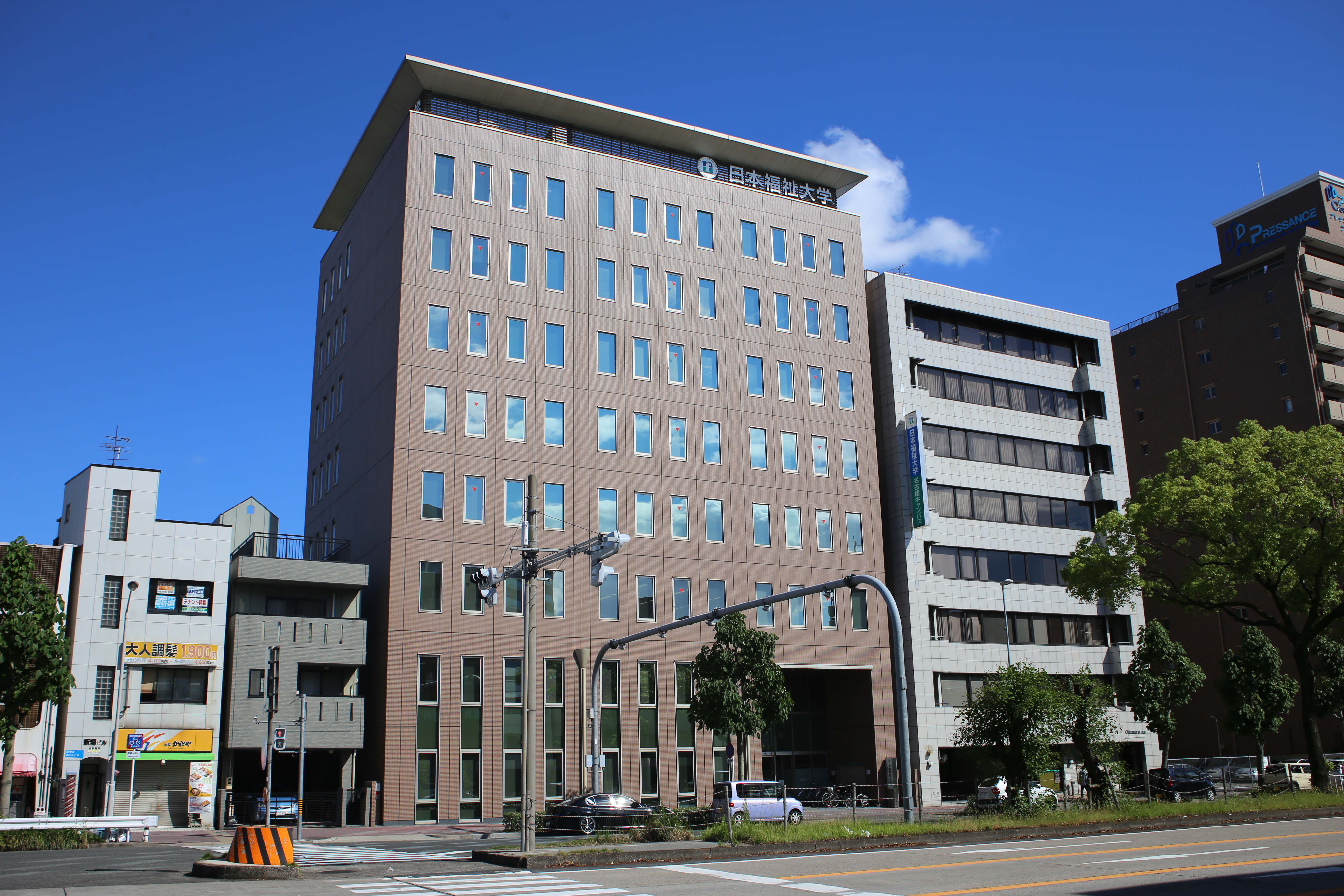 名古屋市中区千代田の日本福祉大学名古屋キャンパス